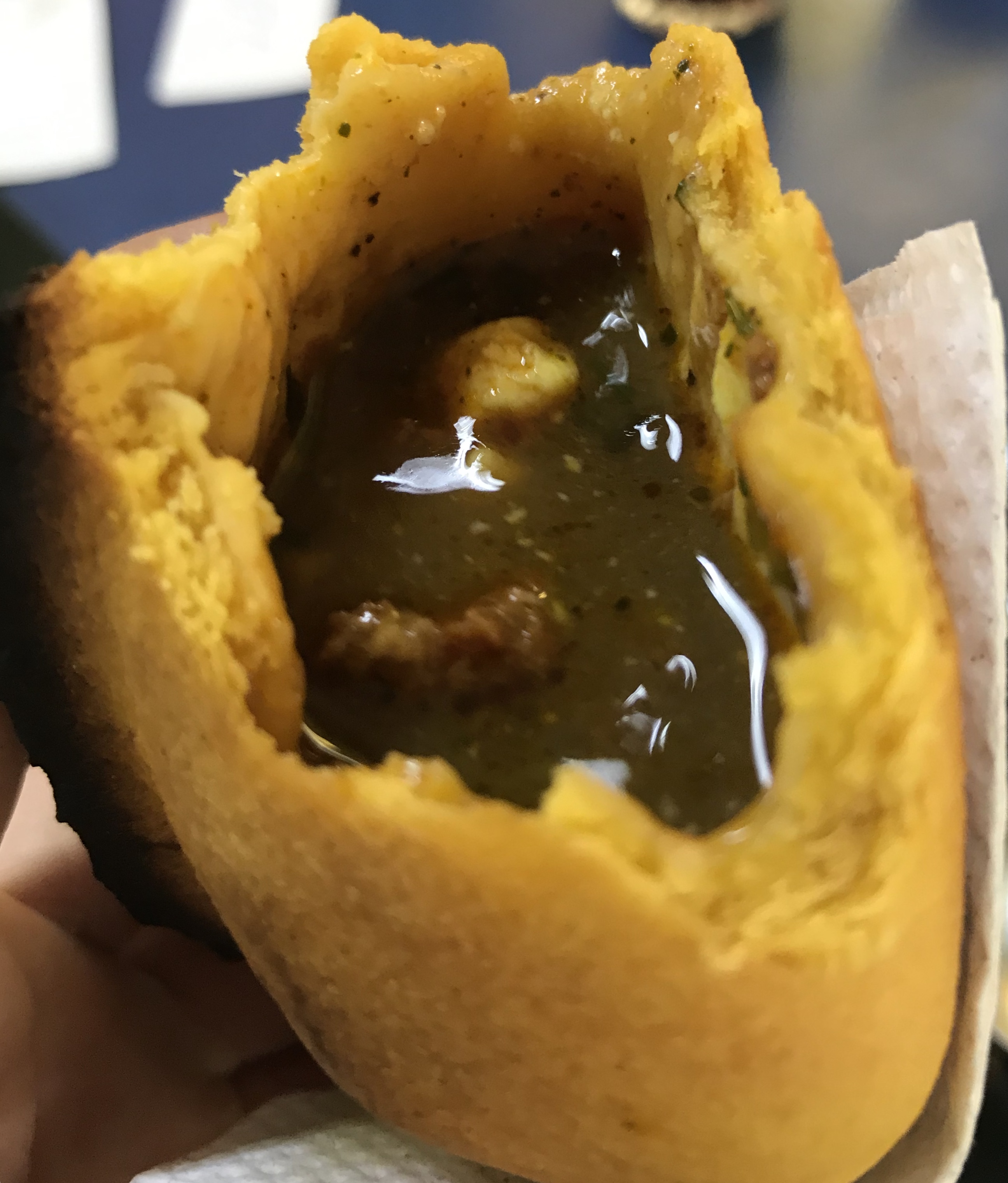 El interior con caldo o jugo que caracteriza a la Salteña boliviana